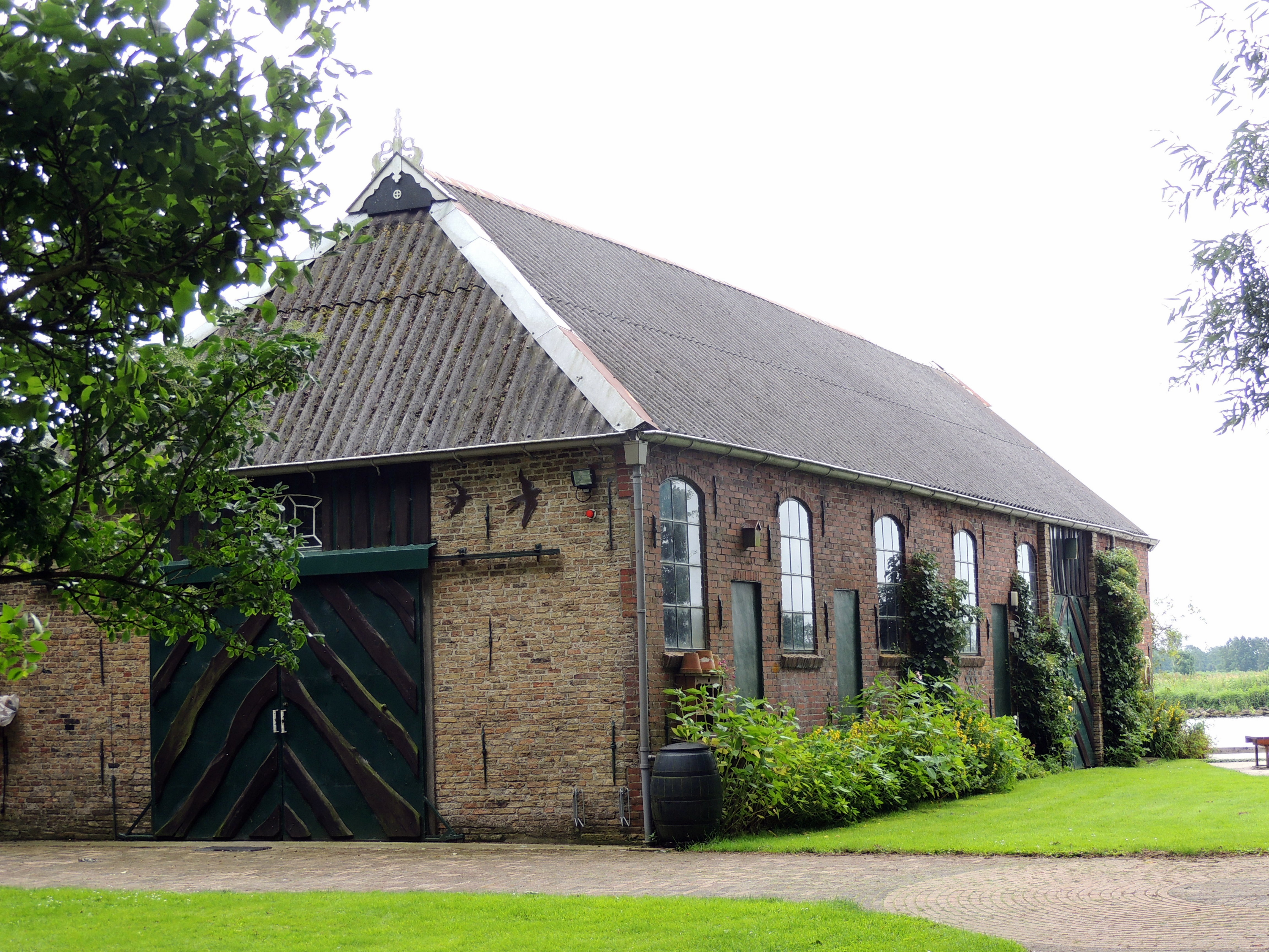 Voorheen Scheepswerf Kuipers